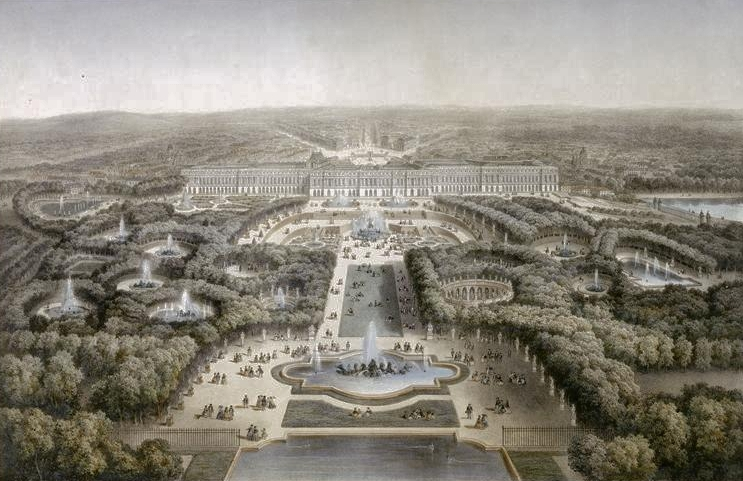 Vue à vol d’oiseau des jardins de Versailles